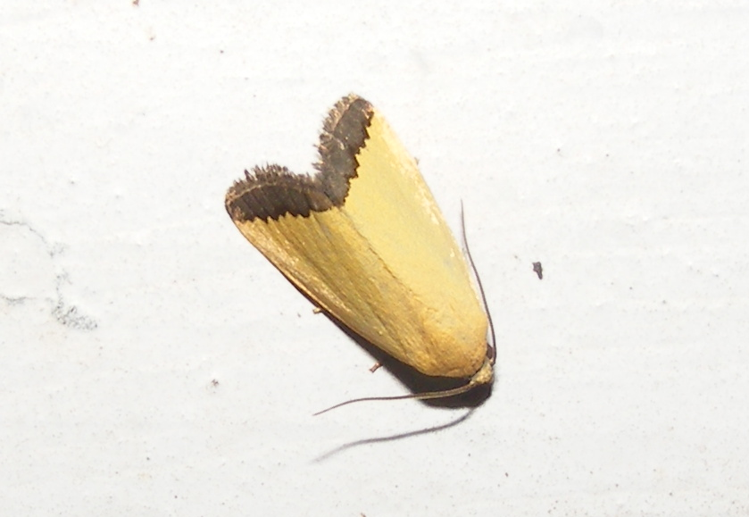 Thanks Roger for id